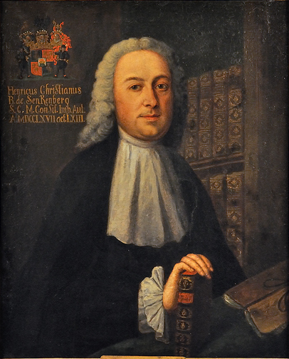 Bildnis des Heinrich Christian von Senckenberg (1704–1768), Bruder von Johann Christian Senckenberg, Vater von Renatus Leopold Christian von Senckenberg